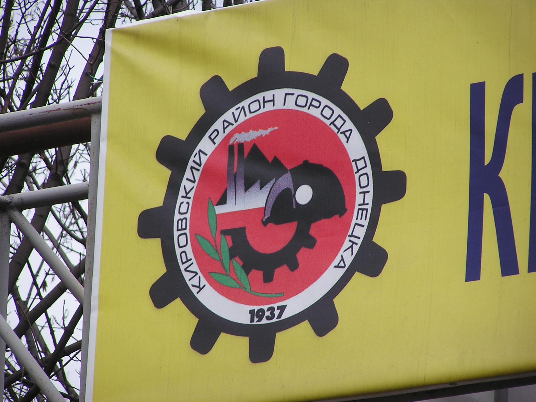 Донецк. Герб Кировского района